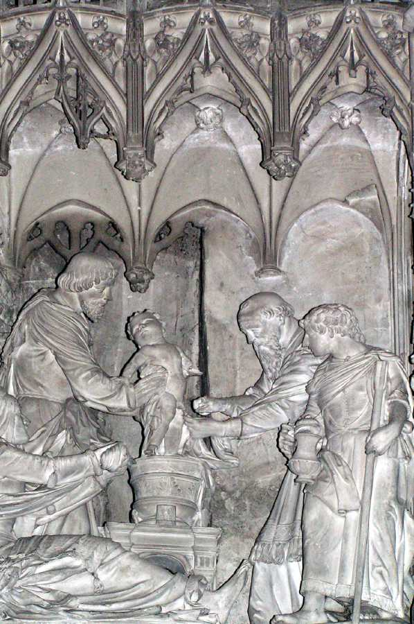 Cathédrale de Chartres, groupes sculptés du Tour du chœur : scène n° 11, 1a Circoncision de Jésus. Attribué à Jehan Soulas.